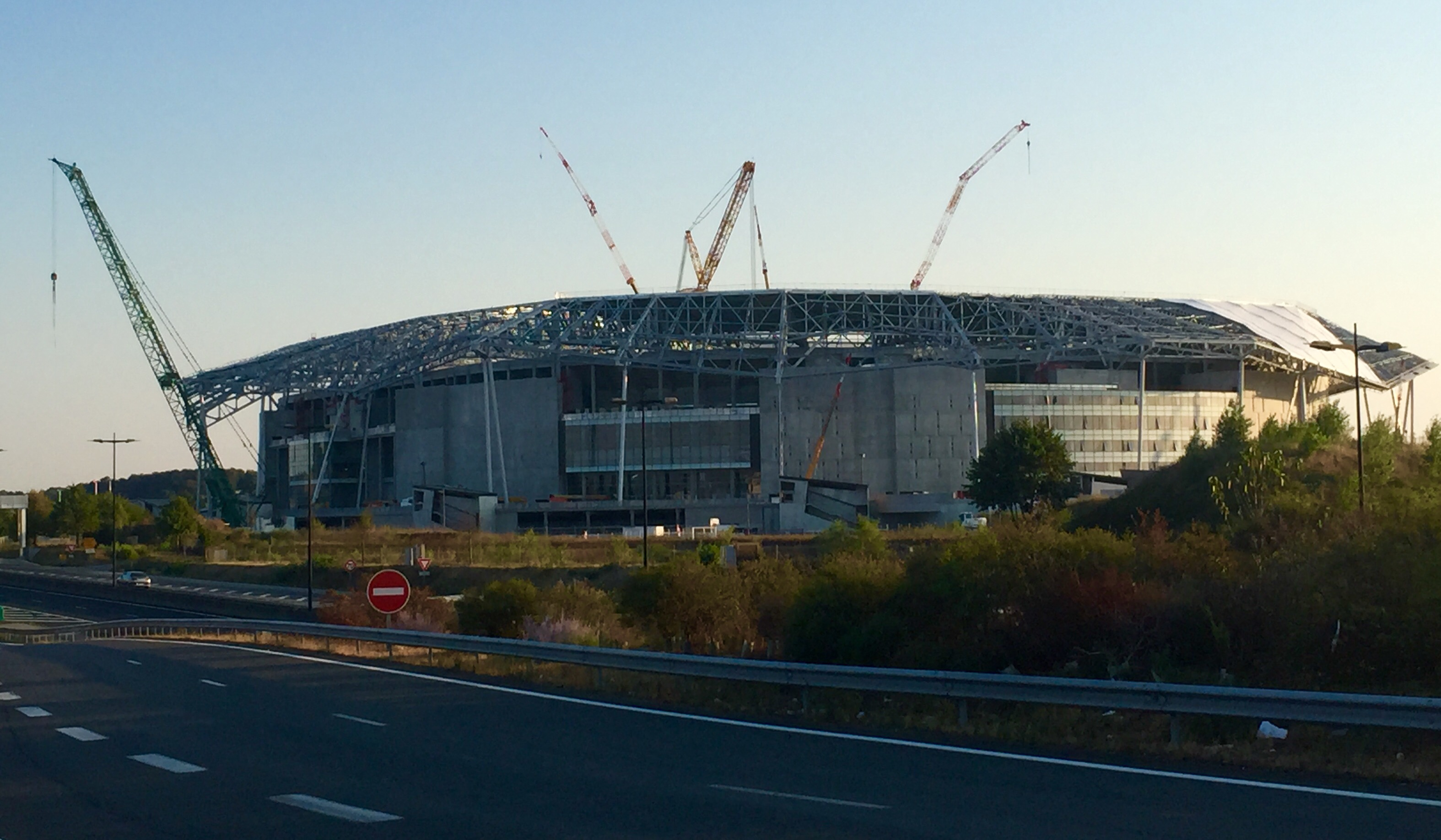 Stade des Lumières.